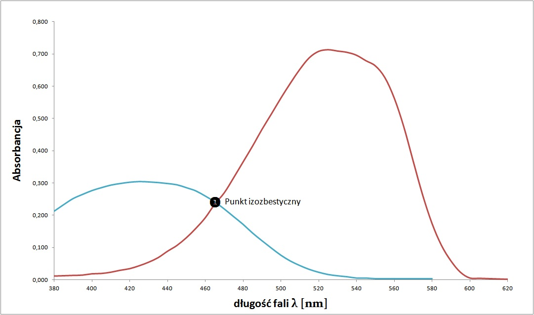 Zależność absorbancji od długości fali - punkt izozbestyczny.